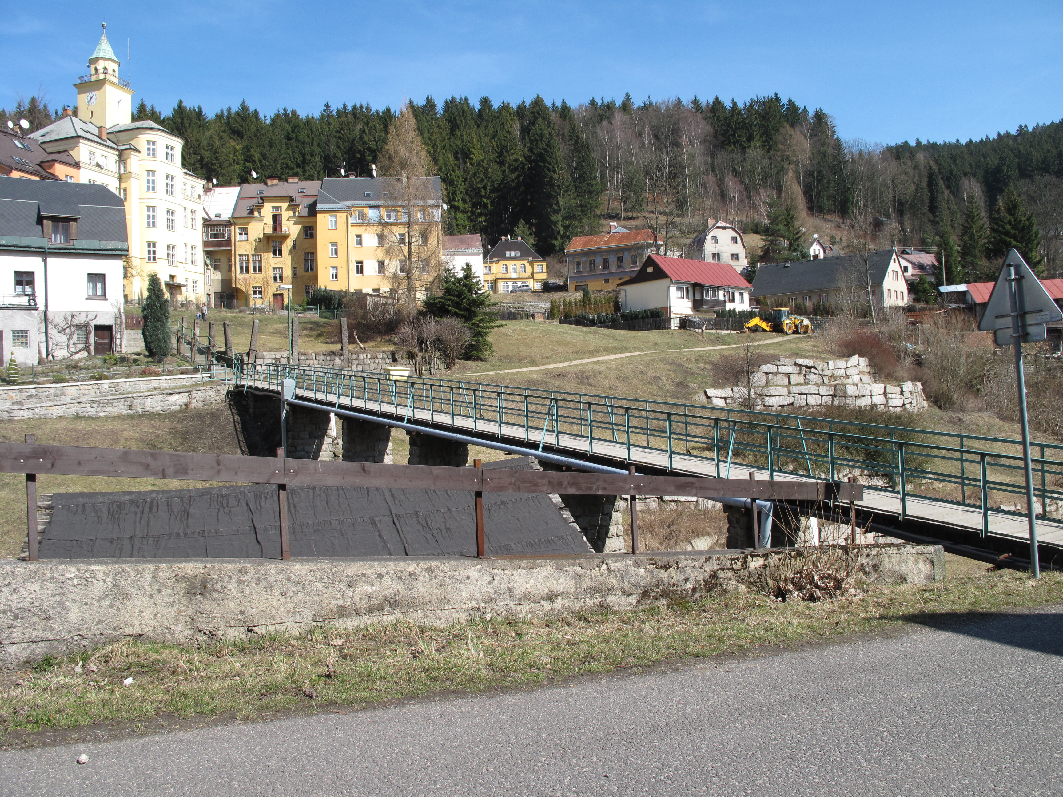 Lávka v Janově nad Nisou. Okres Jablonec nad Nisou, Česká republika.